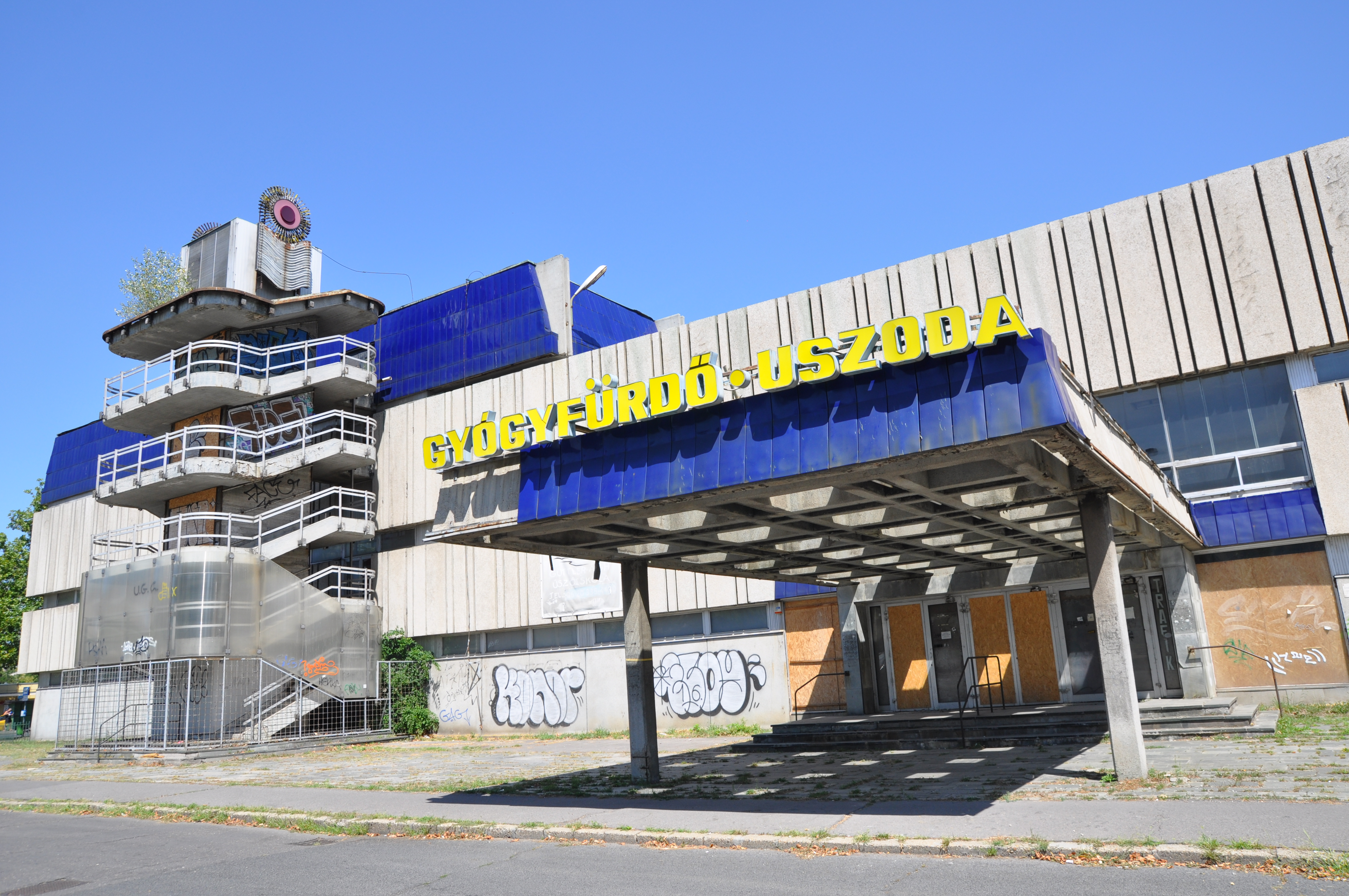 Újpesti Uszoda